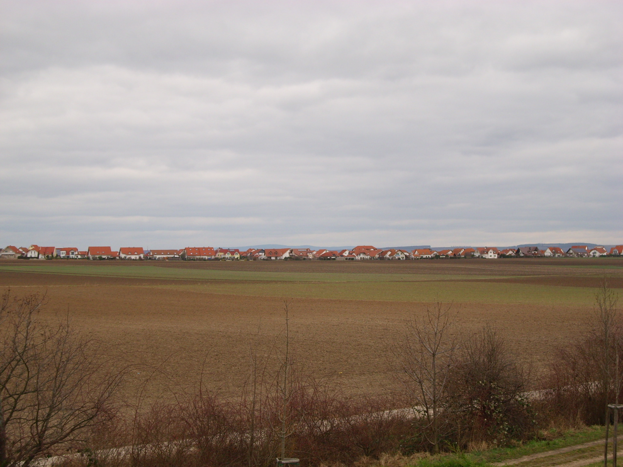 Blick über einen Teil von Wöllstein